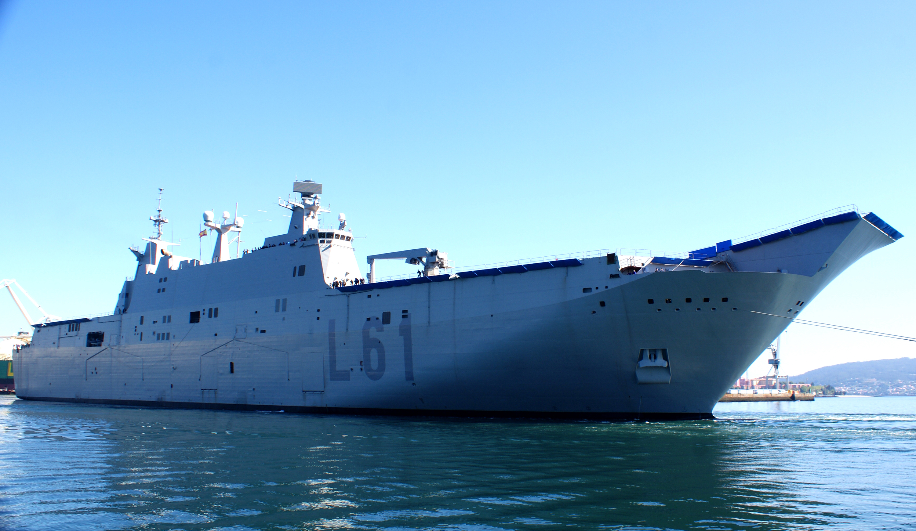 LHD Juan Carlos I (L-61) . Clase Juan Carlos I de la Armada Española, iniciando sus primeras pruebas de mar en Ferrol.